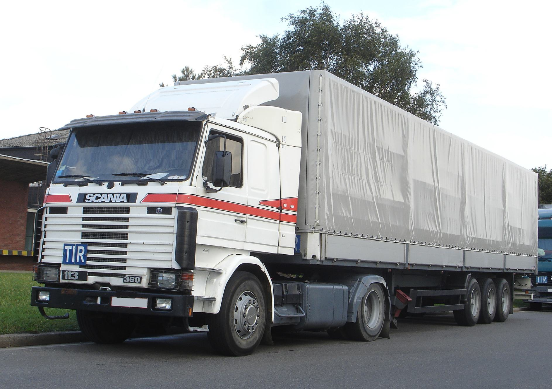 Scania 113M 360 Pritschensattelzug.